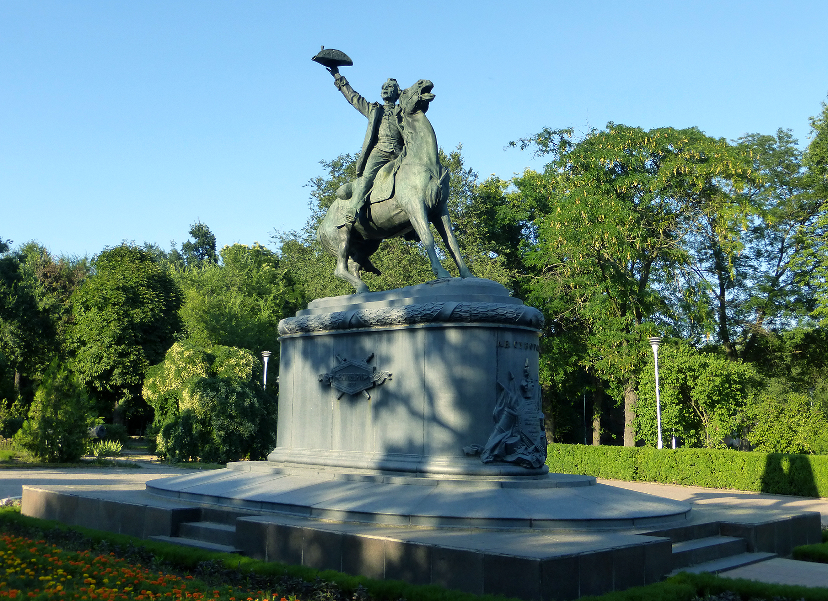 Пам'ятник російському полководцю О.В. Суворову, Ізмаїл, Суворова просп.